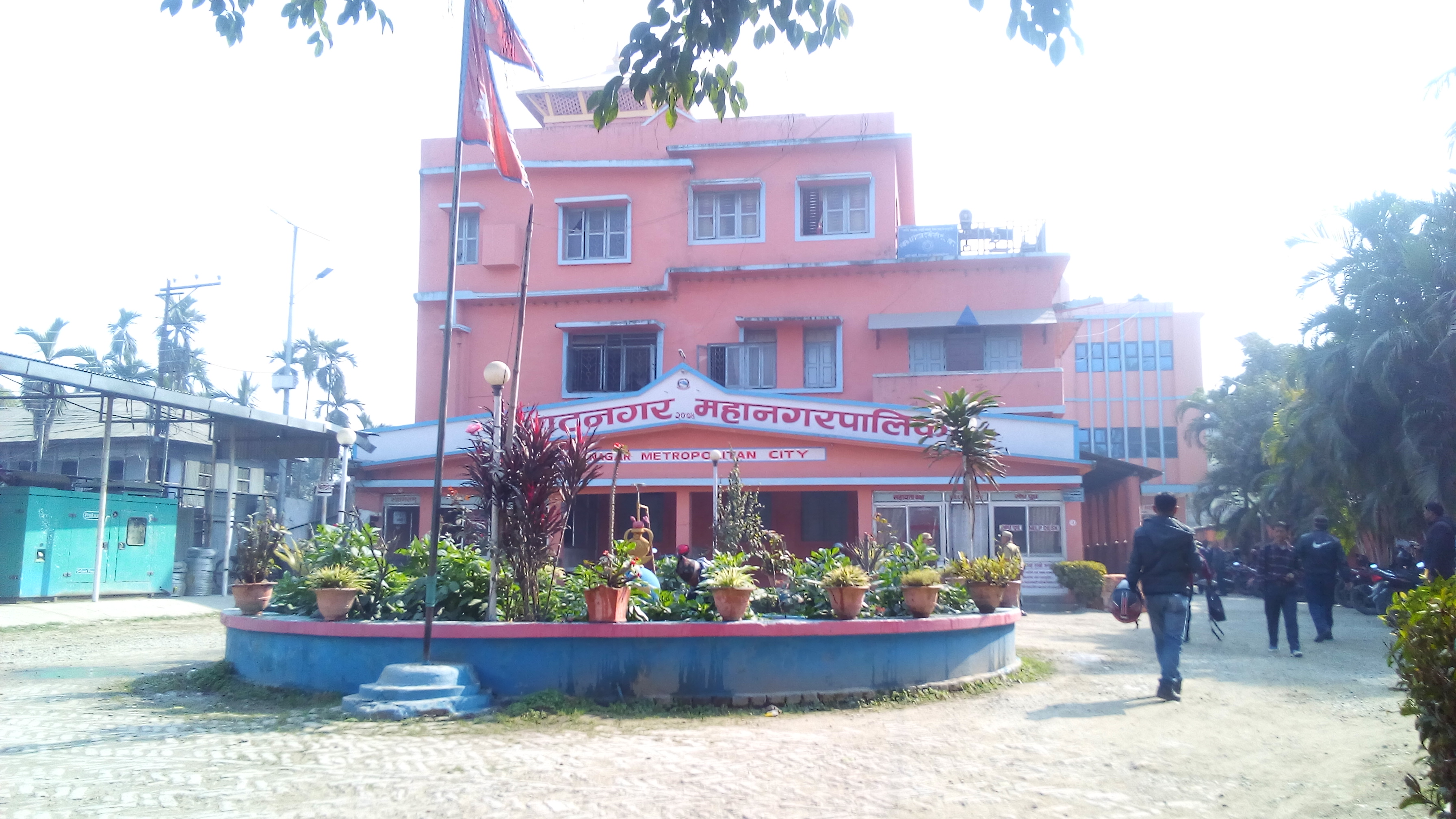 नेपाली: विराटनगर महानगरपालिका कार्यालय